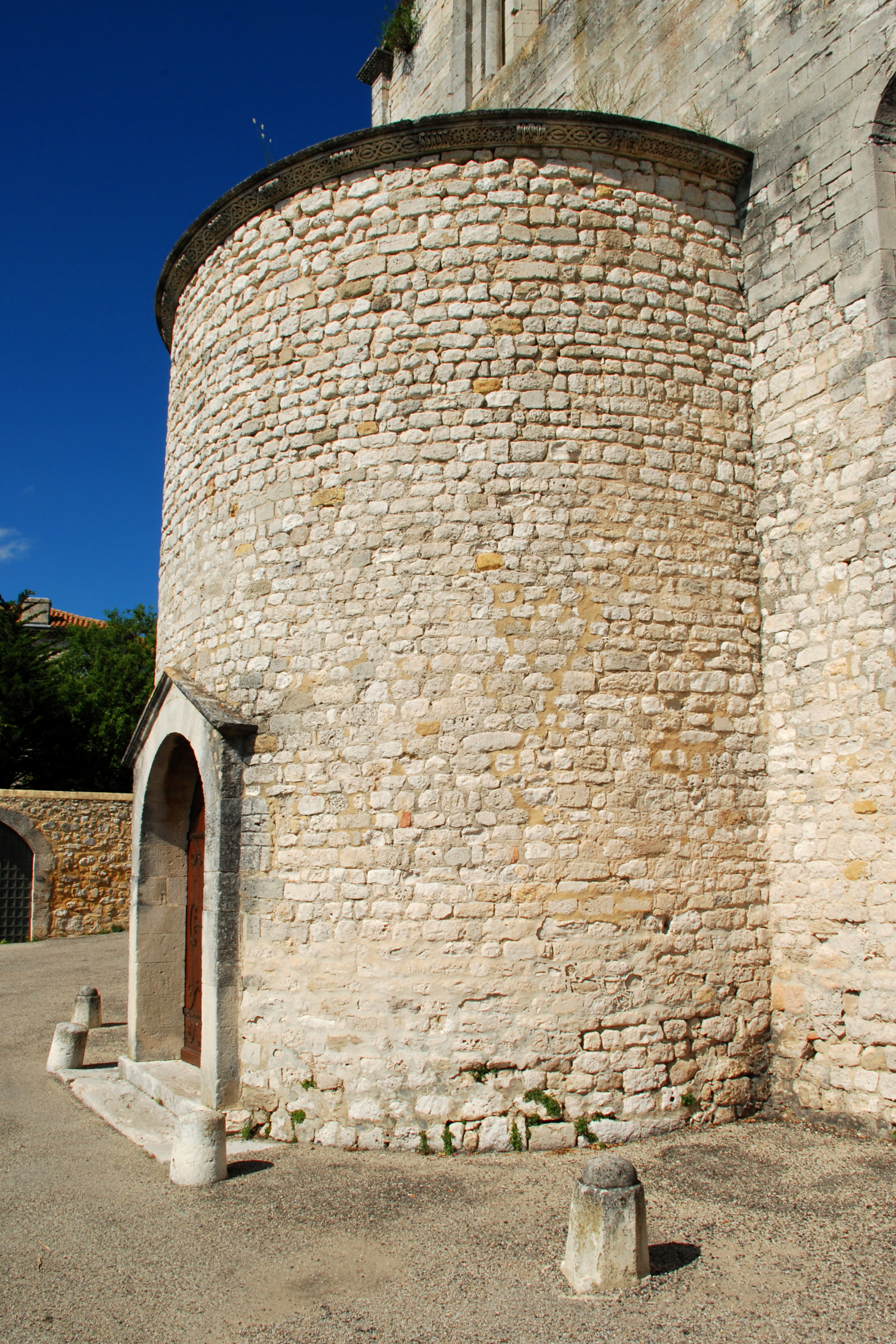 France - Drôme - La Garde-Adhémar